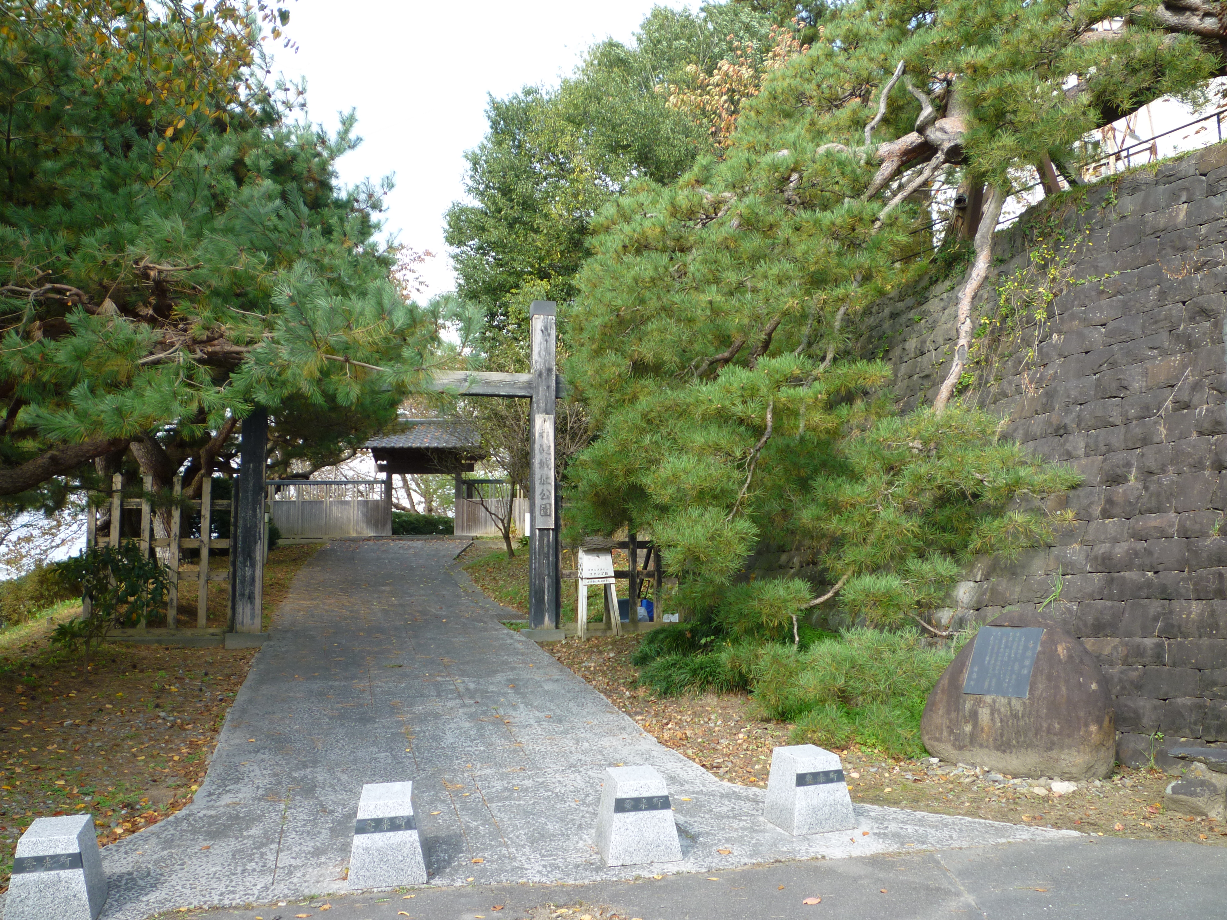 登米寺池城址入り口